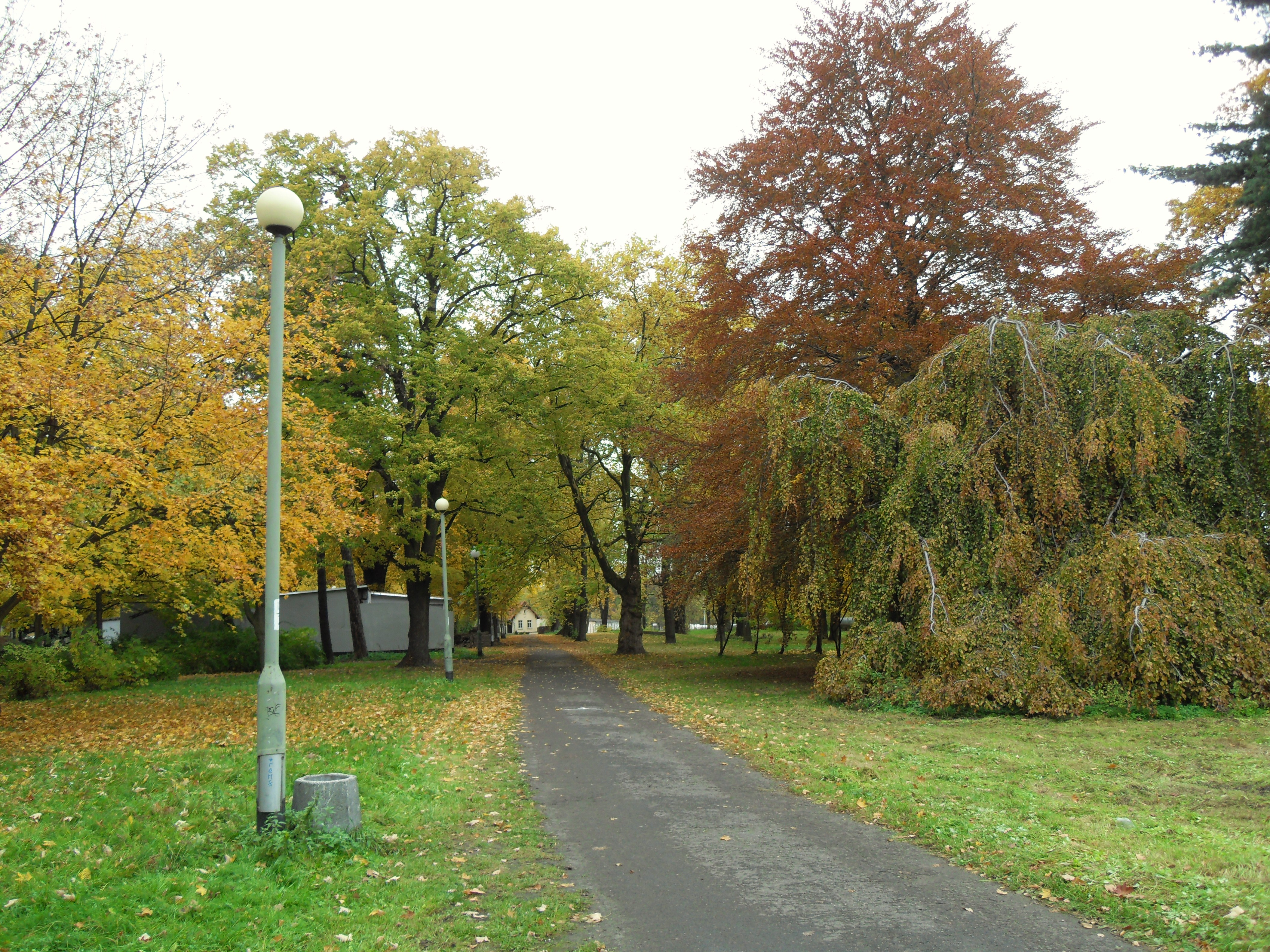 Gdańsk Aniołki. Park Steffensa.